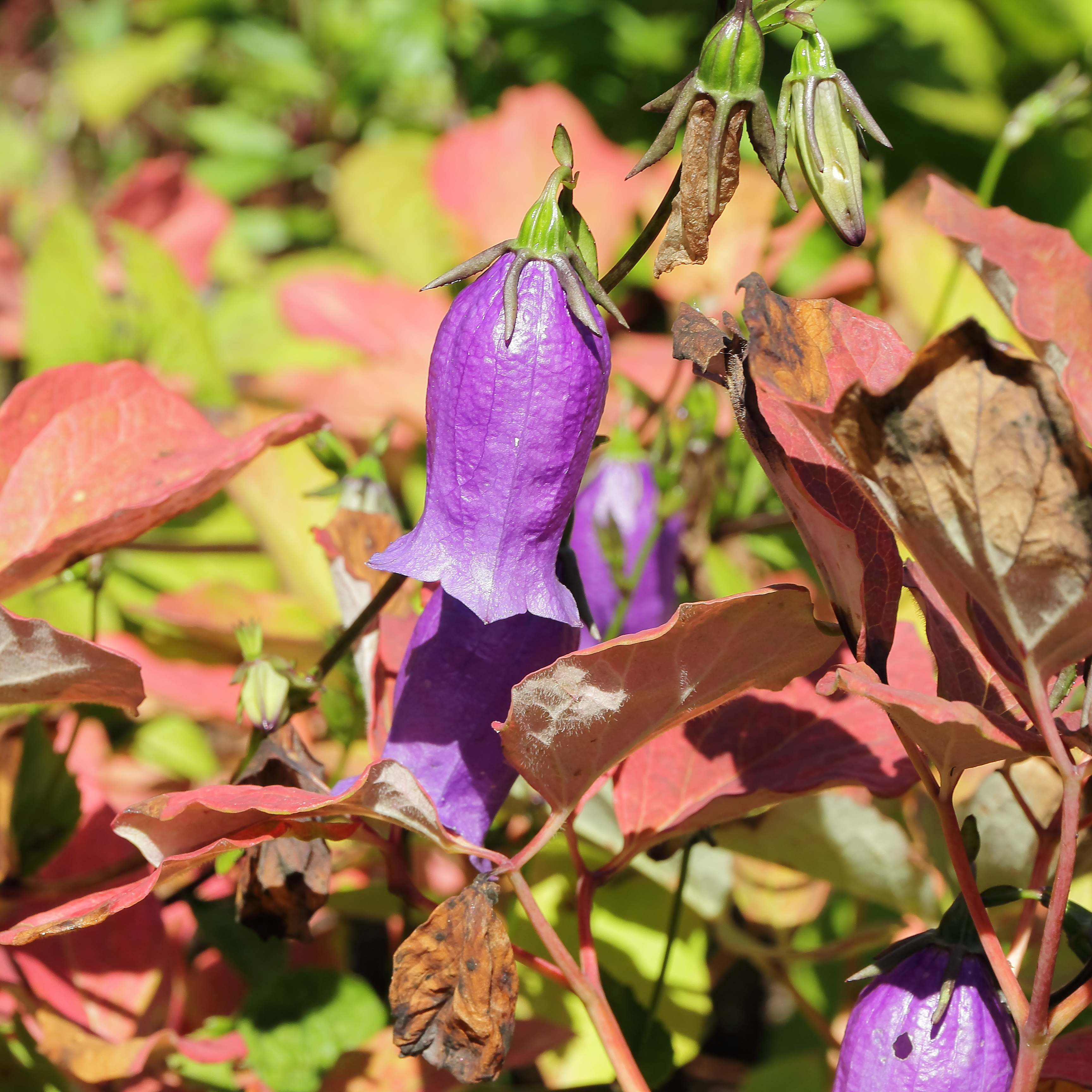 Hanabusaya asiatica i Göteborgs Botaniska Trädgård.